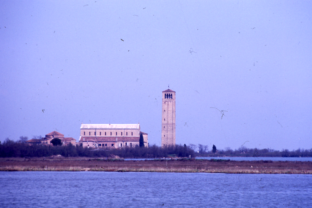 Servizio fotografico : Venezia, 1982 / Paolo Monti. - Strisce: 3, Fotogrammi complessivi: 9 : Diapositiva, sviluppo cromogeno/ pellicola ; 35 mm. - ((Sul portanegativi: "Ve - [...]". - Ektachrome X Film. - Il contenitore in pvc è staccato dal portanegativi in carta. - N.B. Possibile sottoserie (1):. - 8-10? = Torcello. - Fonte: Rubrica di Paolo Monti: Diapositive 24x36mm (1948-1982), presso Archivio Paolo Monti. Rubrica con elenco soggetti e numeri di inventario (da 1 a 1000) corrispondenti ai fogli a tasche in pvc in cui sono contenute le diapositive.